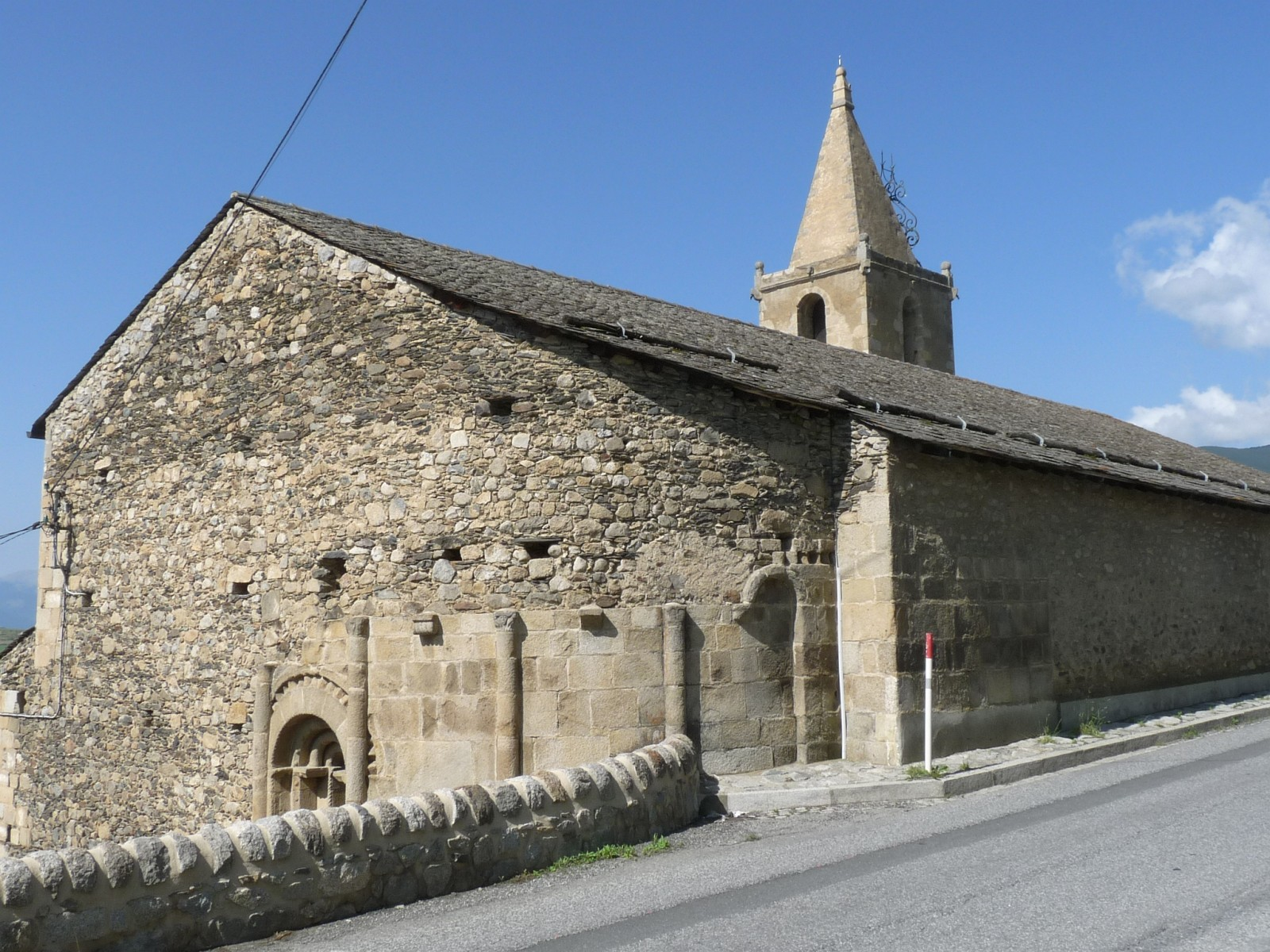 Eglise d'Enveitg, Pyrénées-Orientales, France